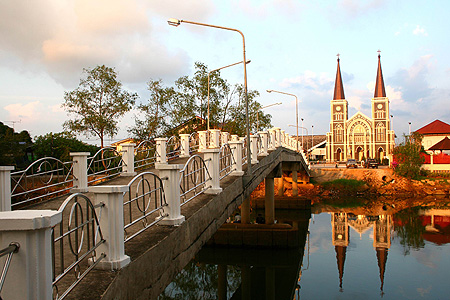 วัดโรมันคาทอลิก